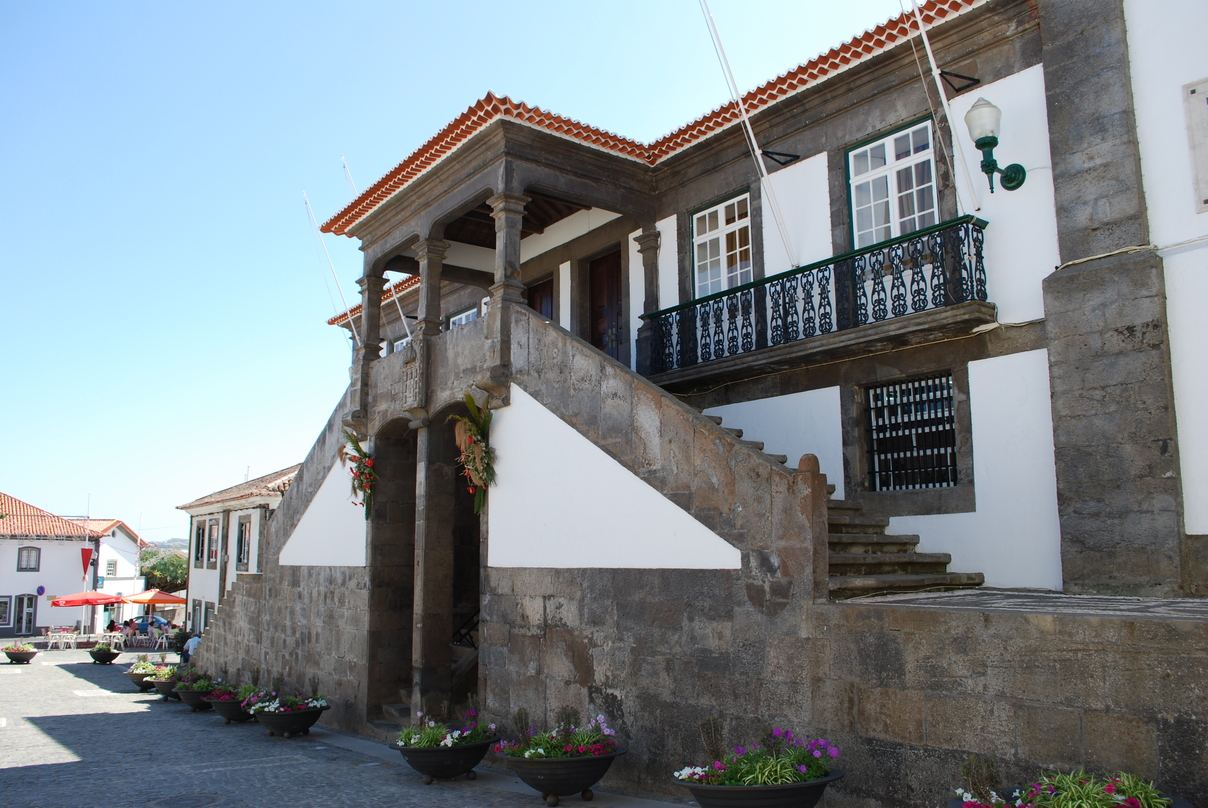 Fachada principal dos Paços do Concelho da Praia da Vitória.